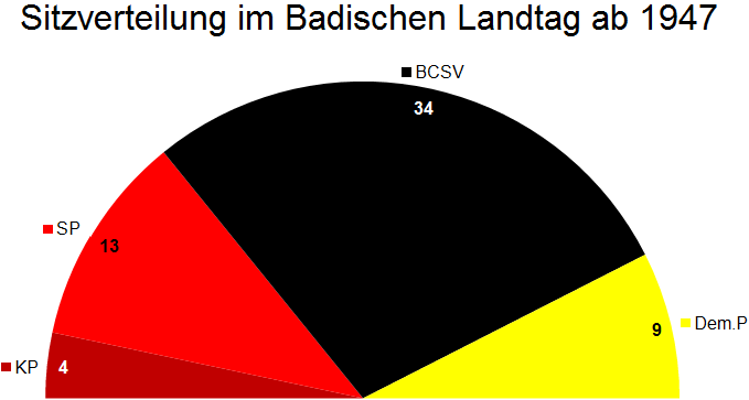 Sitzveretilung im Badischen Landtag nach der Landtagswahl 1947